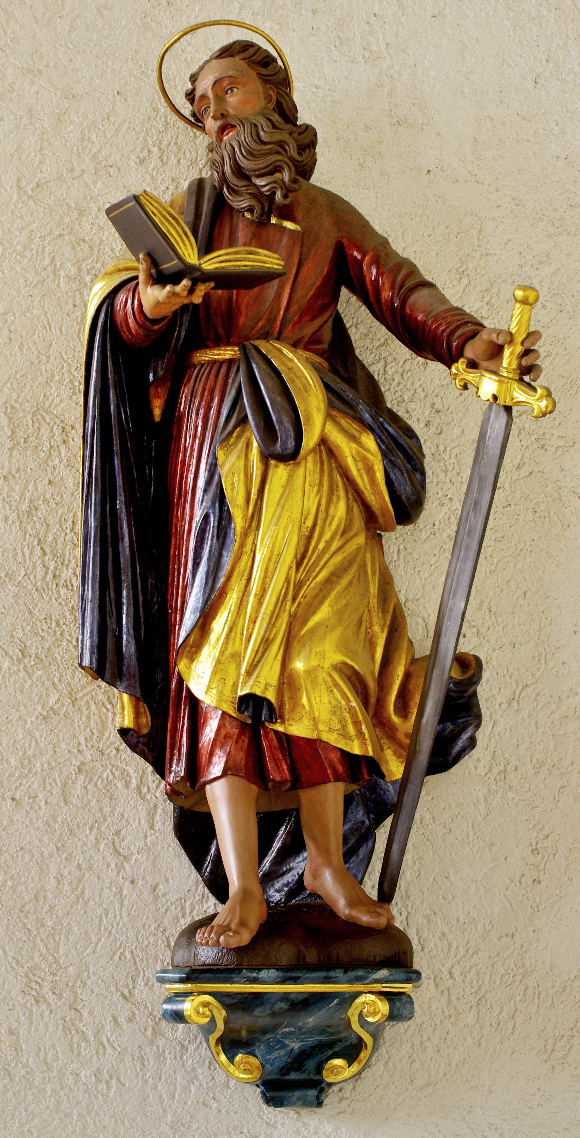 Die Pfarrkirche St. Martin in Vöhrenbach